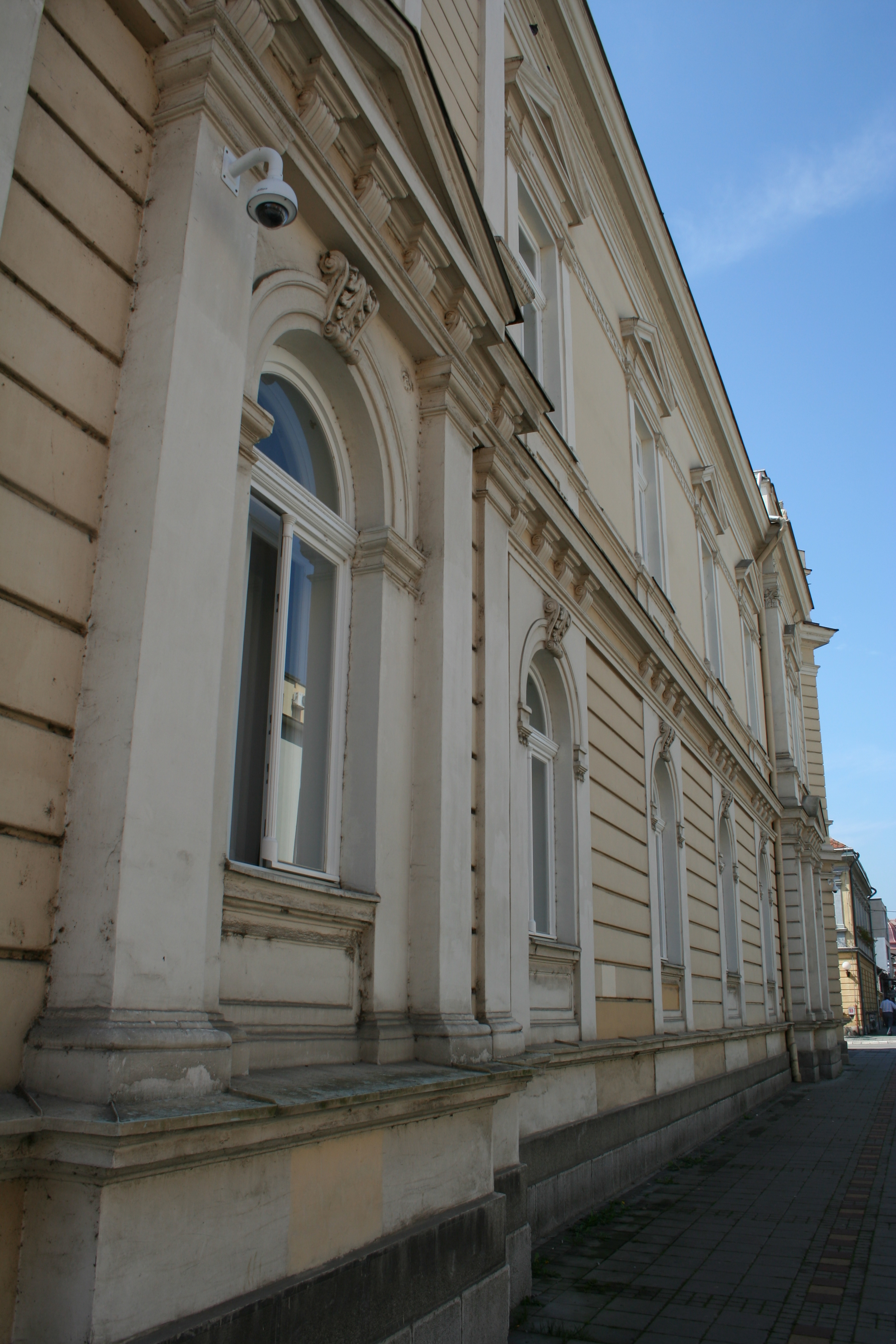 Zgrada okružnog suda, Valjevo